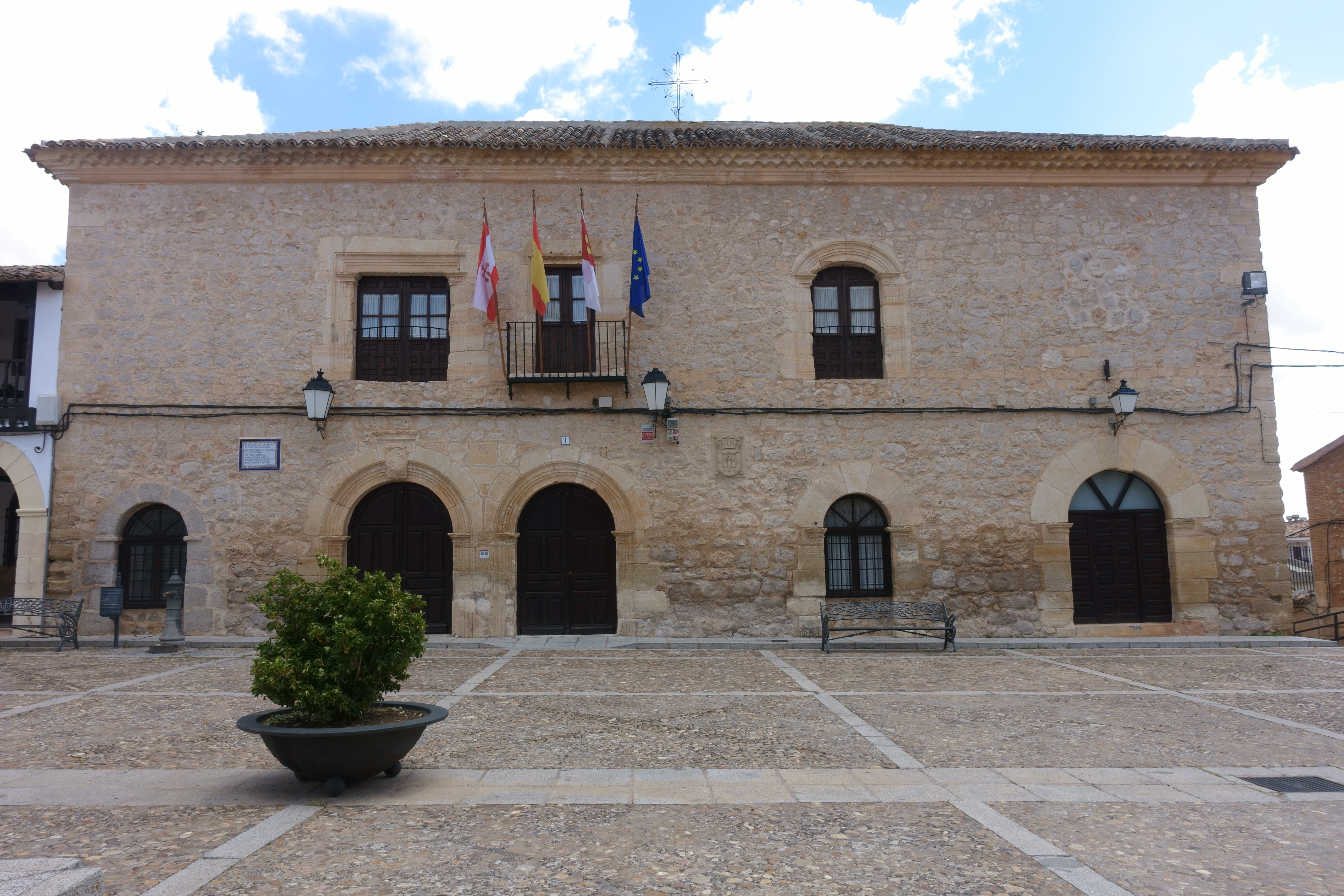 Casa consistorial de Villamayor de Santiago (Cuenca, España).